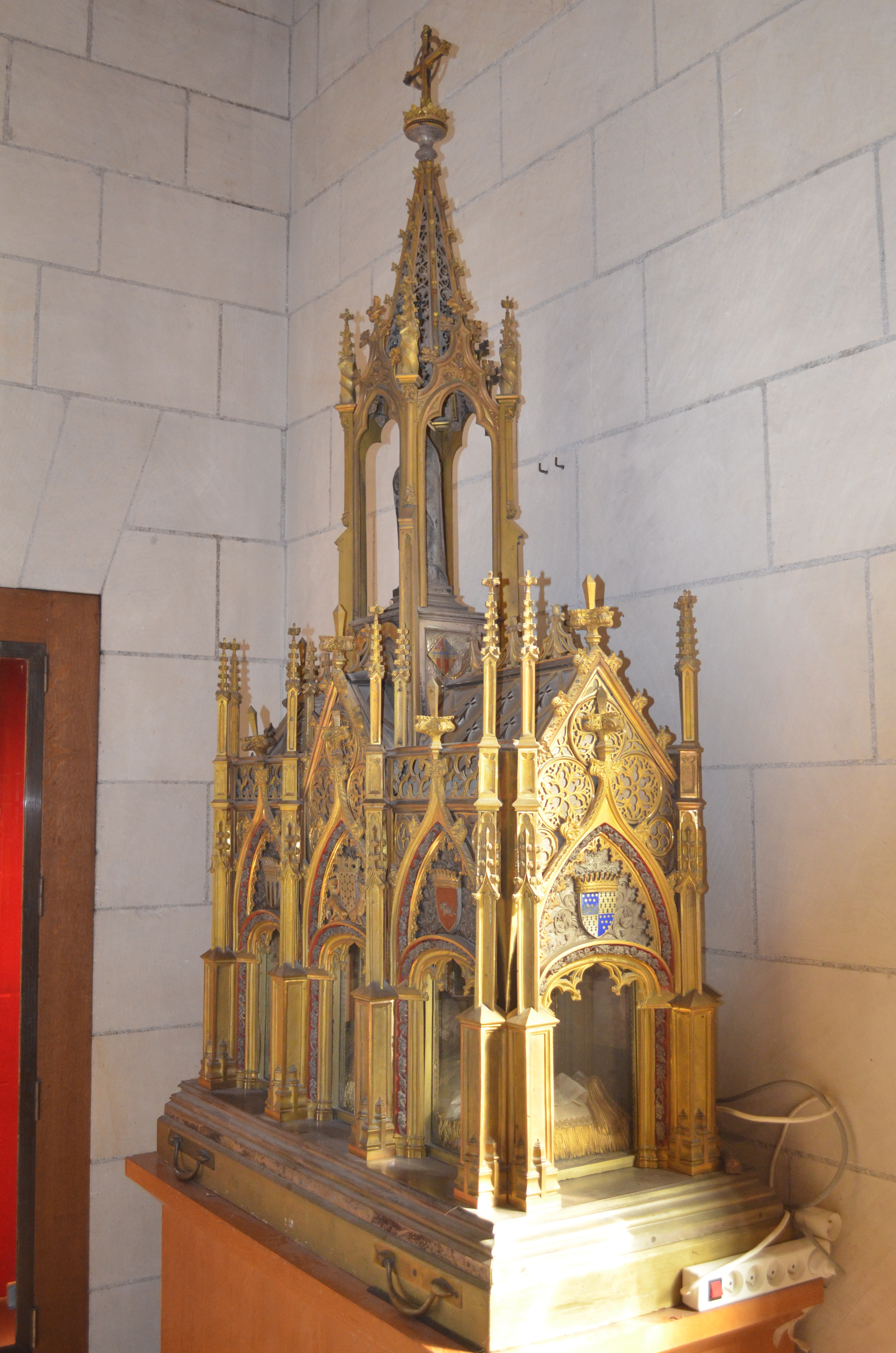 Reliquaire de Françoise d'Amboise présent dans la chapelle de la sacristie de la Cathédrale Saint-Pierre-et-Saint-Paul - Nantes (Loire-Atlantique)